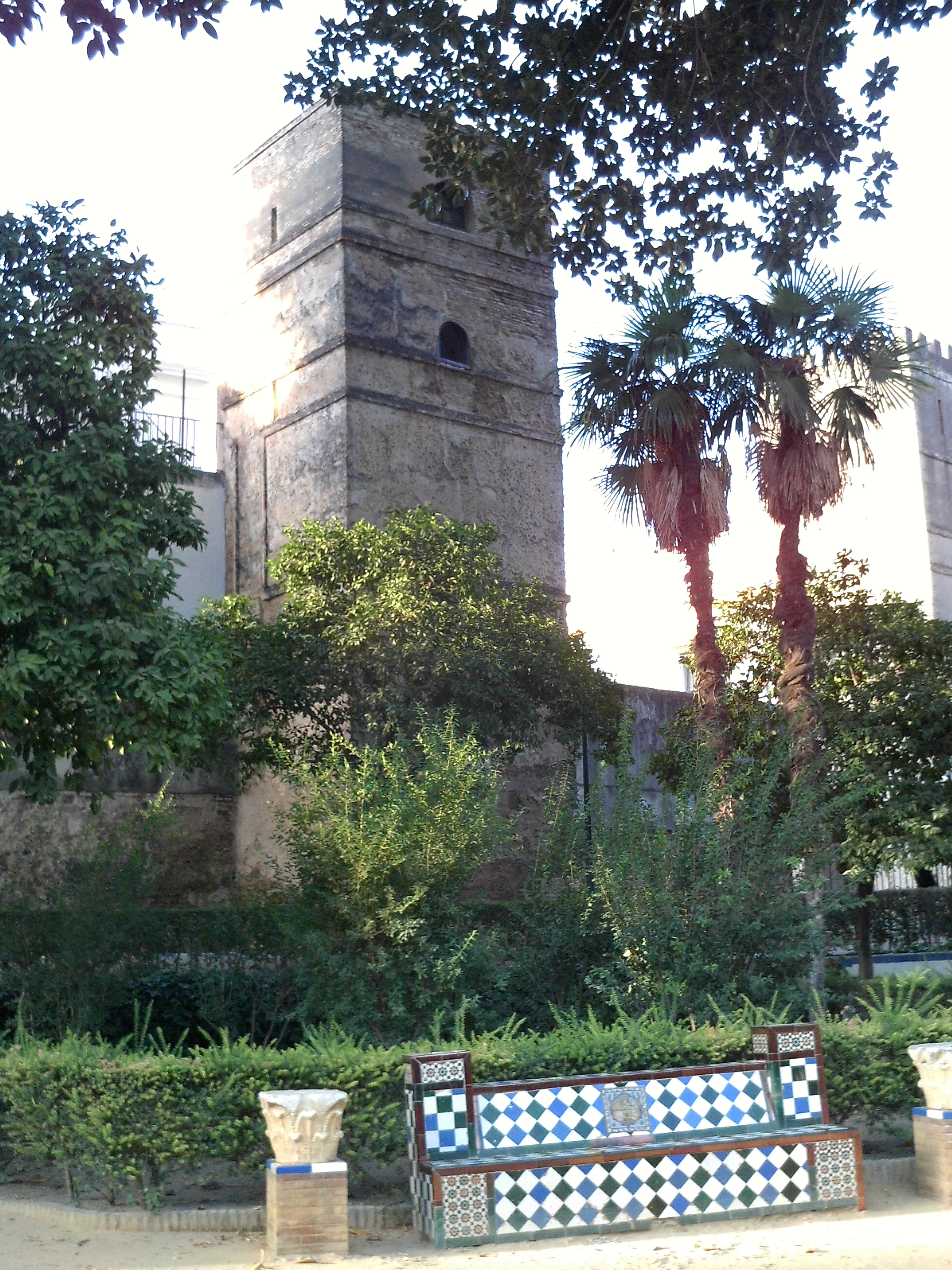 Una torre de la muralla de Sevilla desde los jardines de Murillo. Sevilla, Andalucía, España.